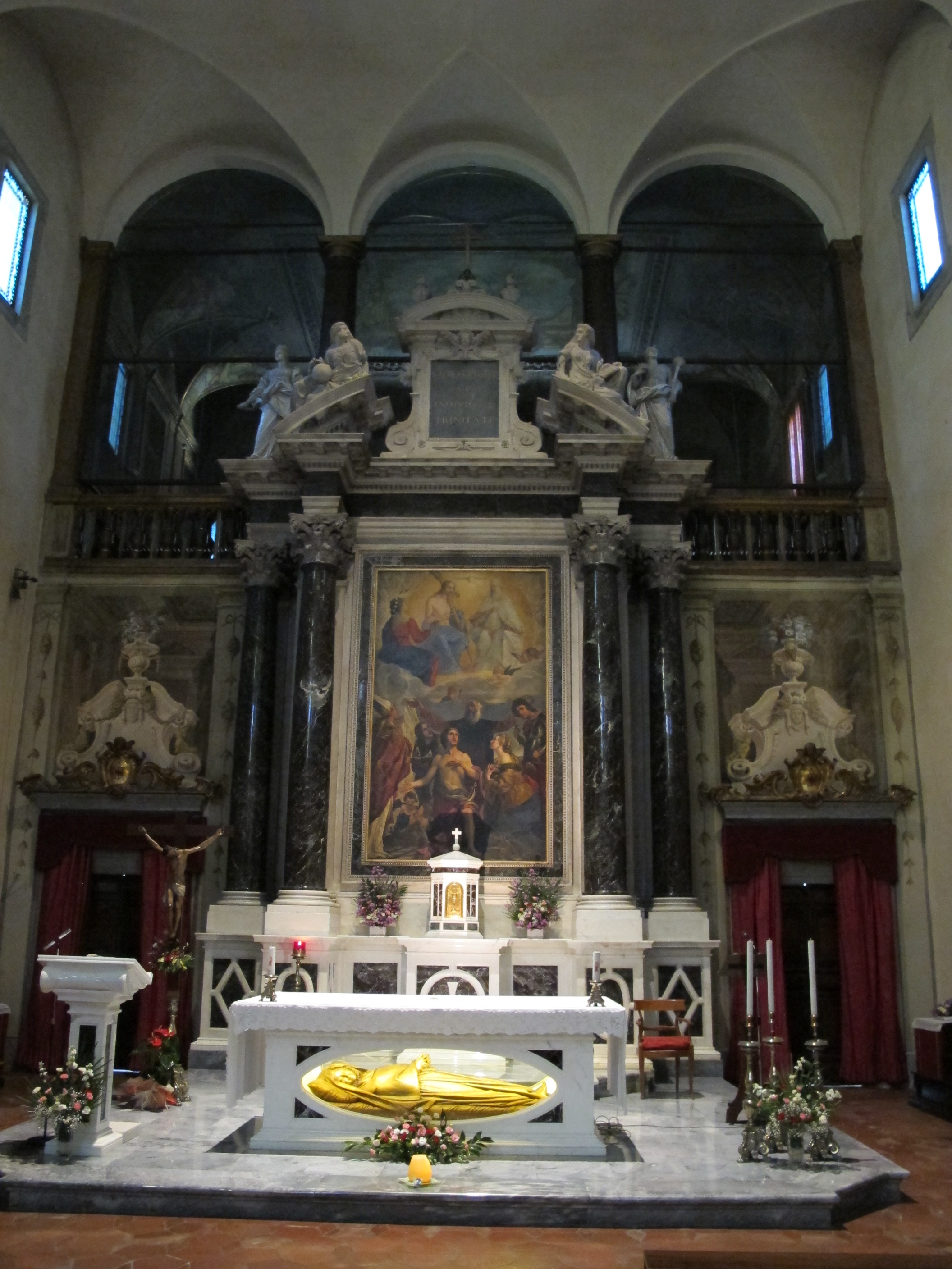 Lucca, ss. trinità, int. 02 altare